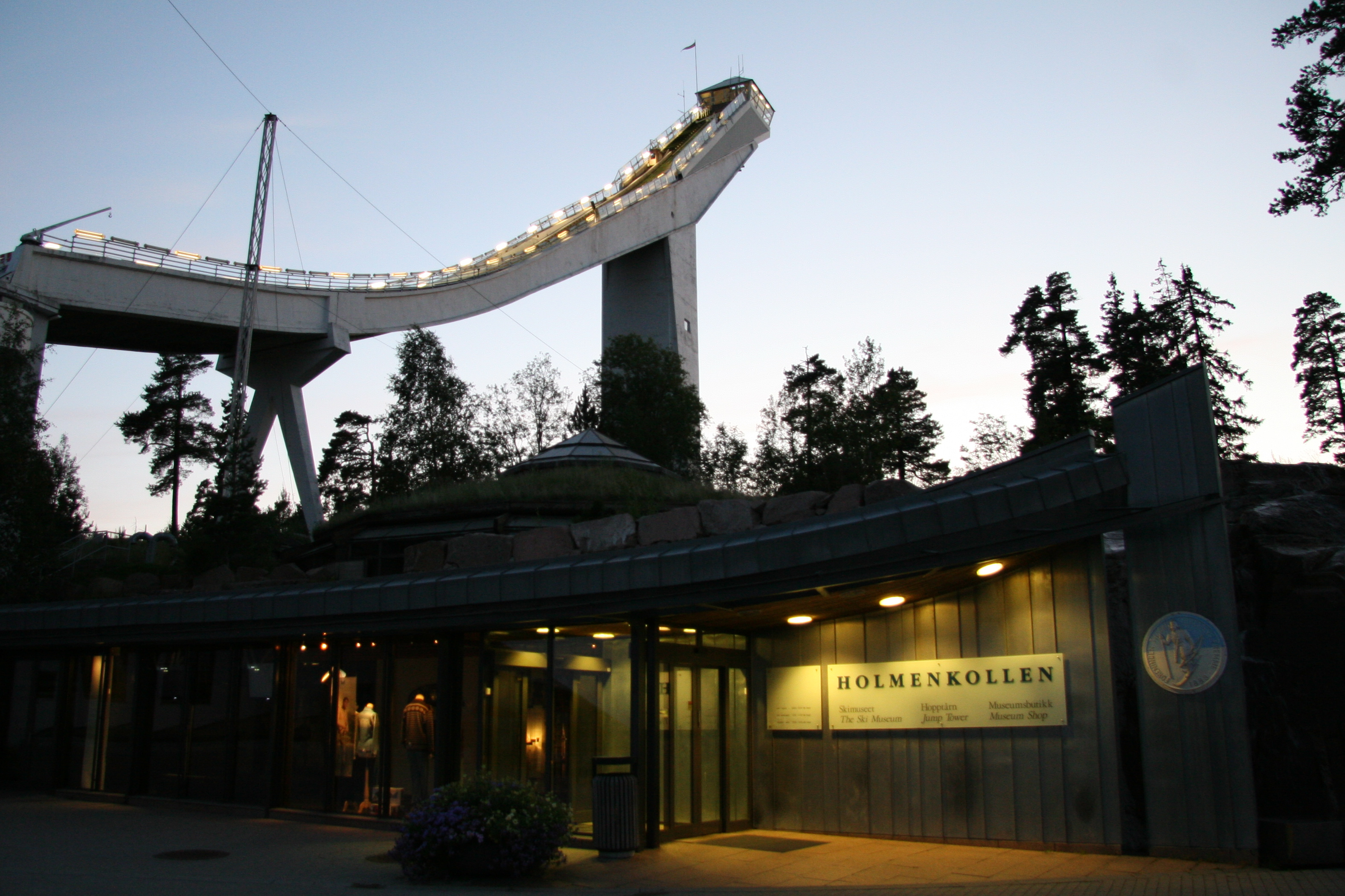 The ski jump at Holmenkollen.